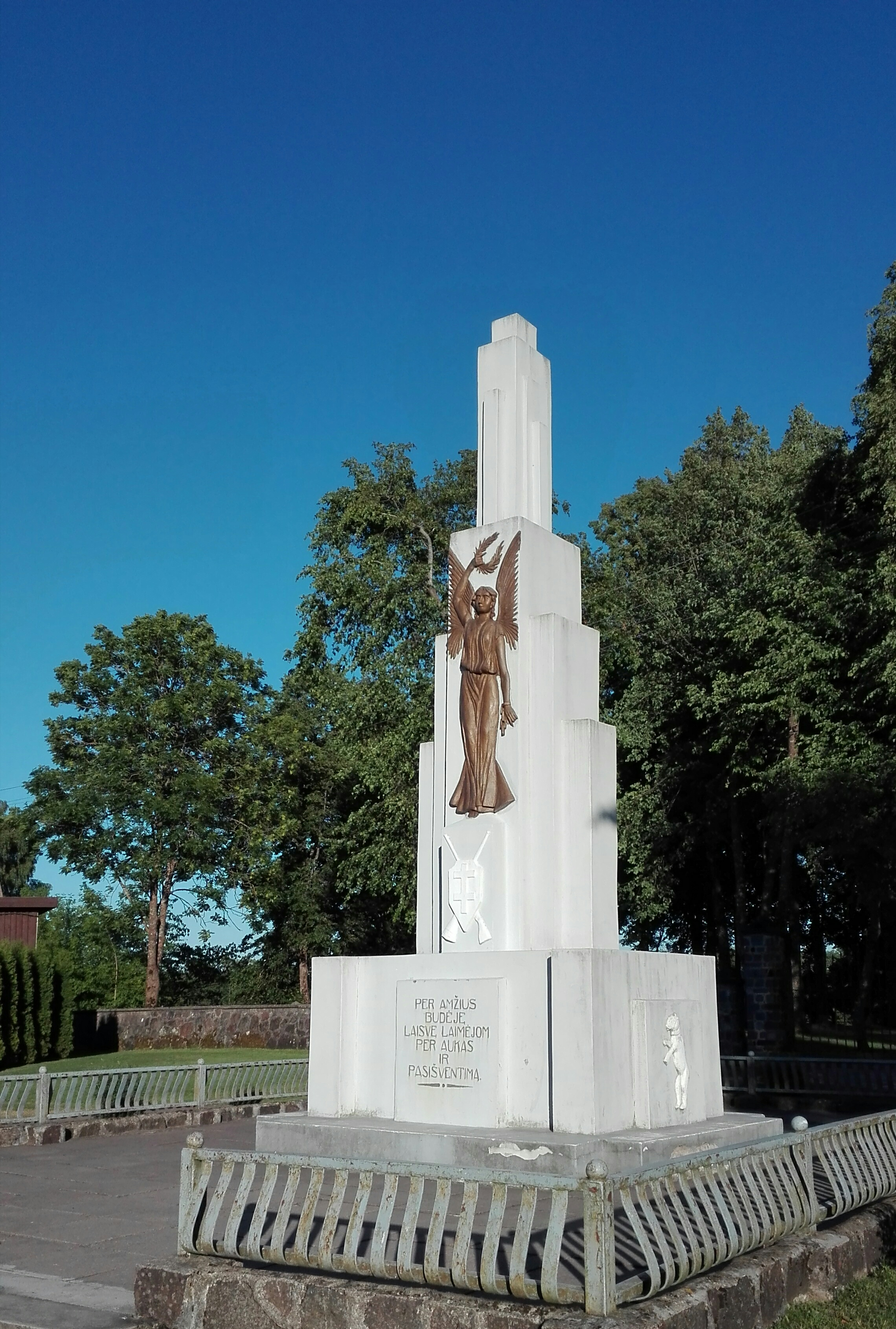 Nepriklausomybės paminklas Veiviržėnuose